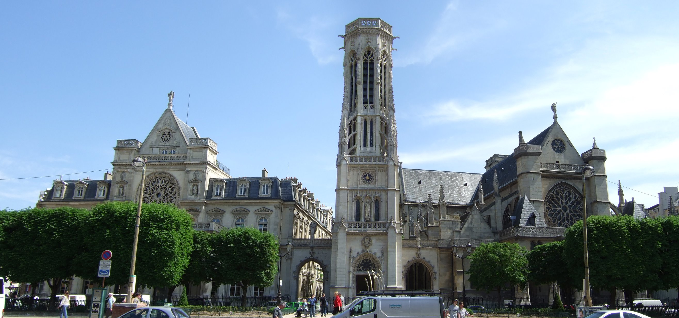 Paris - Saint-Germain-l'Auxerrois - Façade